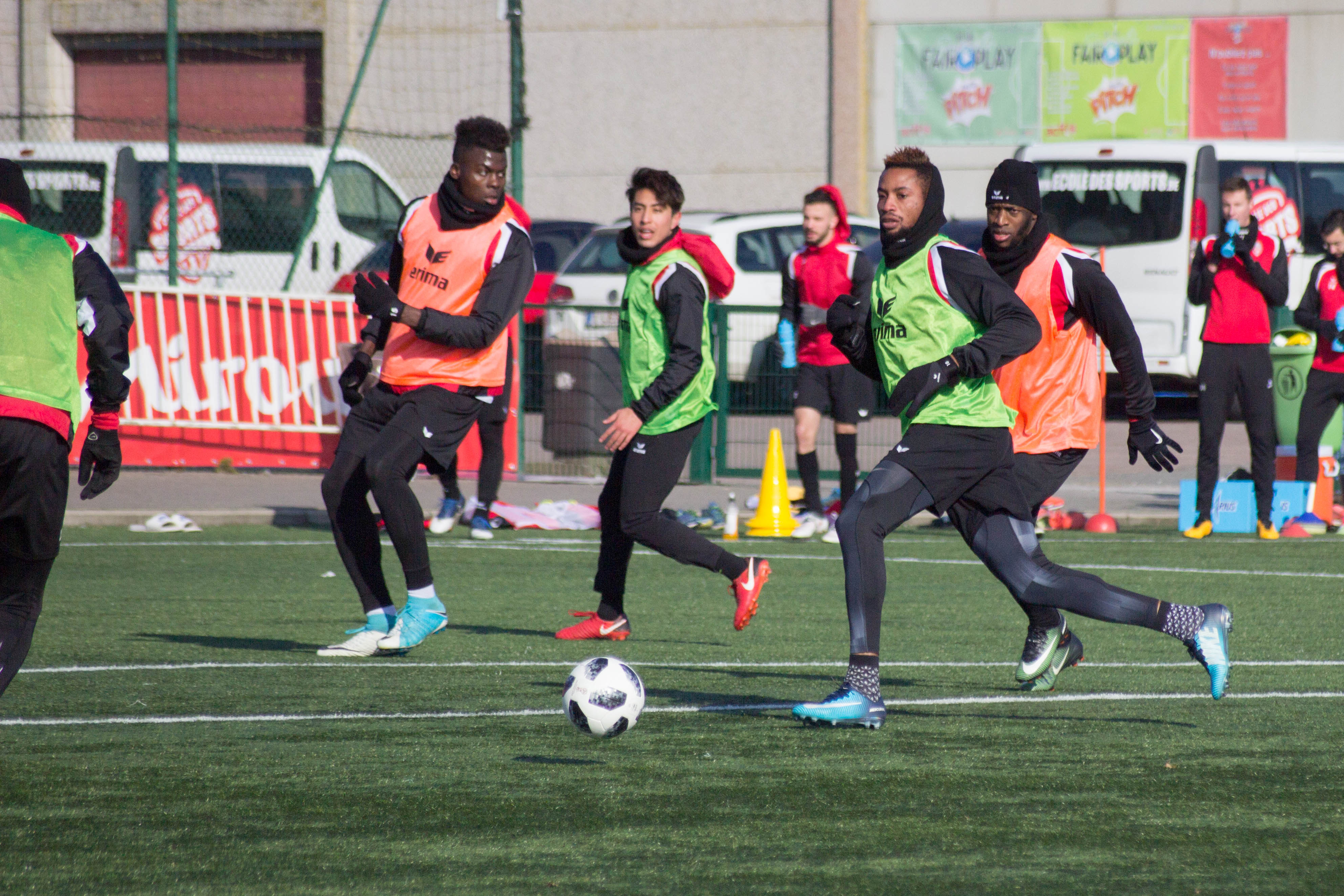 Entrainement du Royal Excel Mouscron, Futurosport, Mouscron. Le 22 Février 2018.